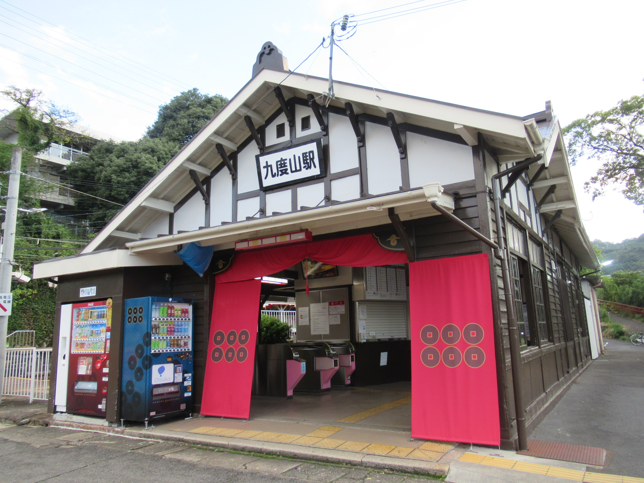 九度山駅舎